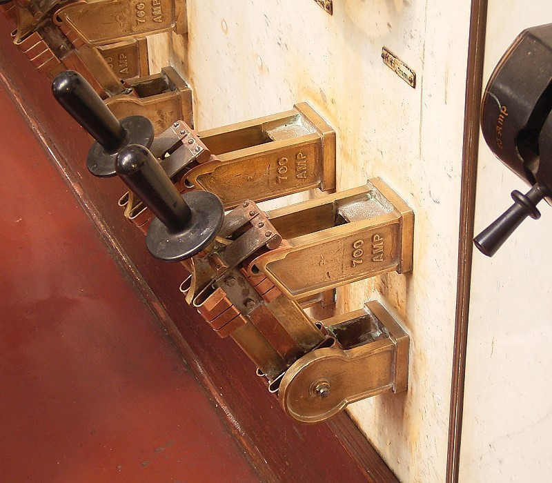 Jugendstil-Kraftwerk in Heimbach / Art Nouveau power plant in Heimbach, Germany